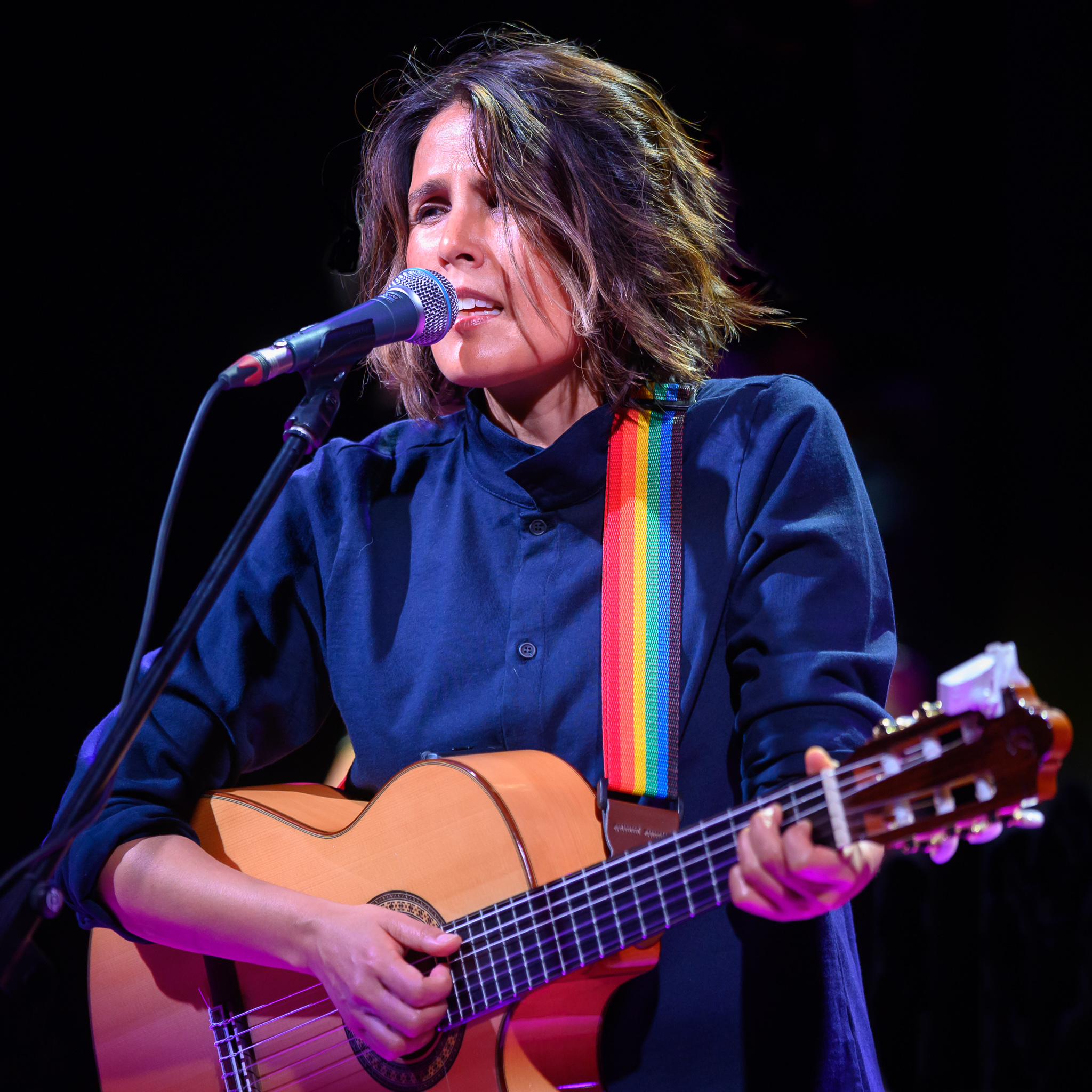 Concertbüro Franken,Kleine Meistersingerhalle,Konzert,Livekonzert,Livemusik,Tanita Tikaram